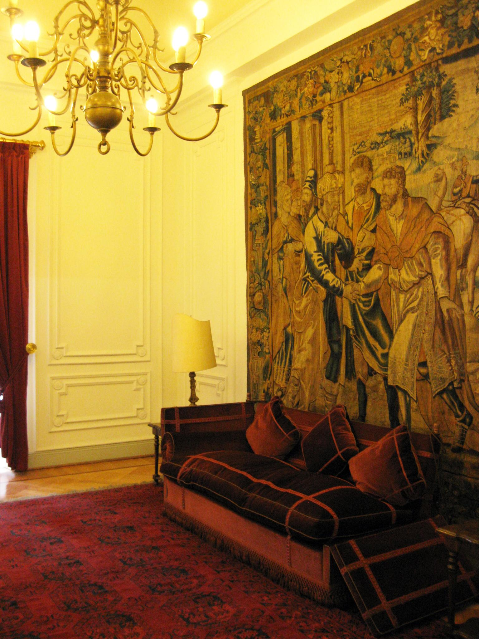 En este sofá, Salvador Allende se suicidó el 11 de Septiembre de 1973